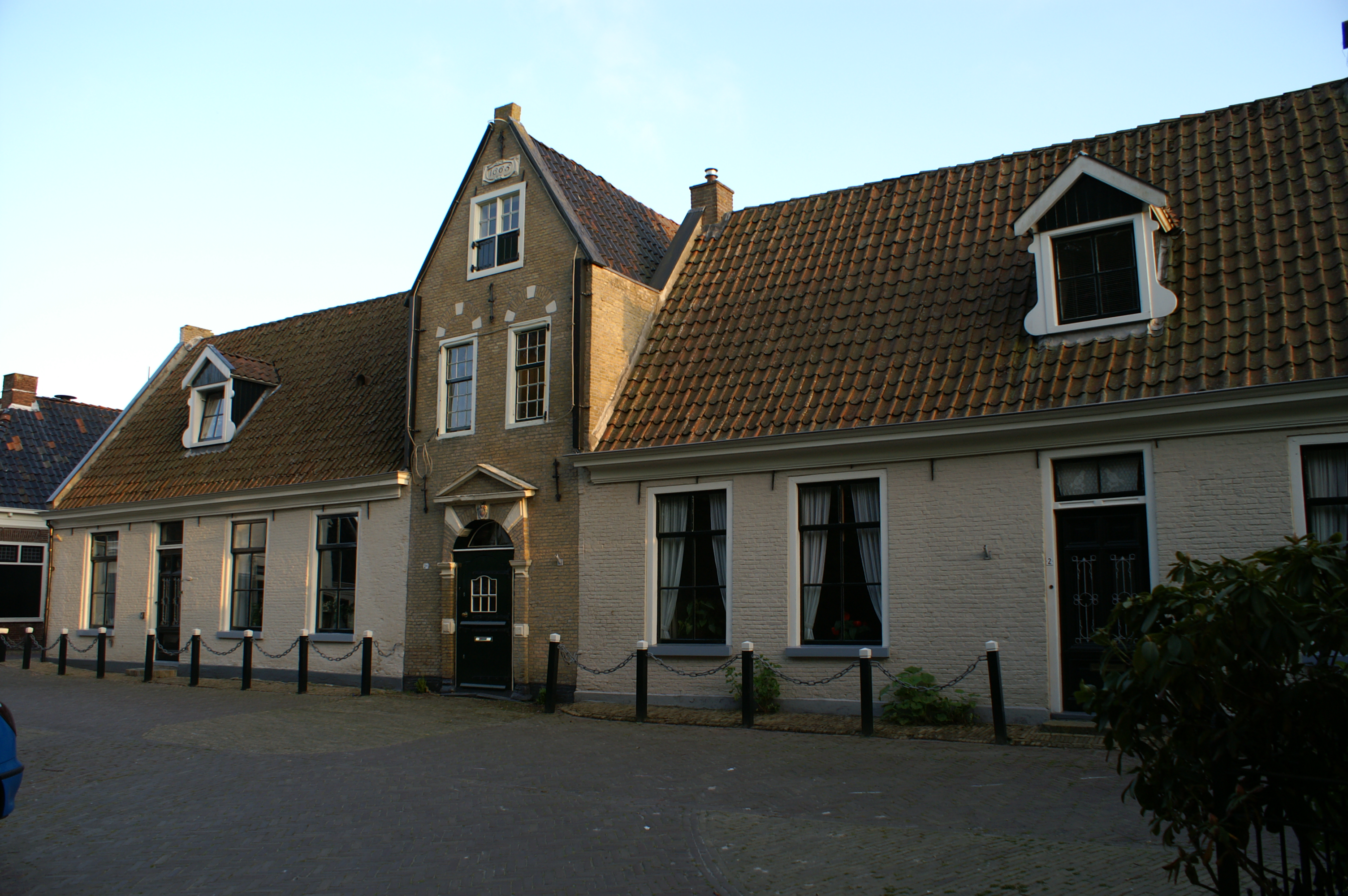 Poortgebouw van het verdwenen Grou-State te Grouw.